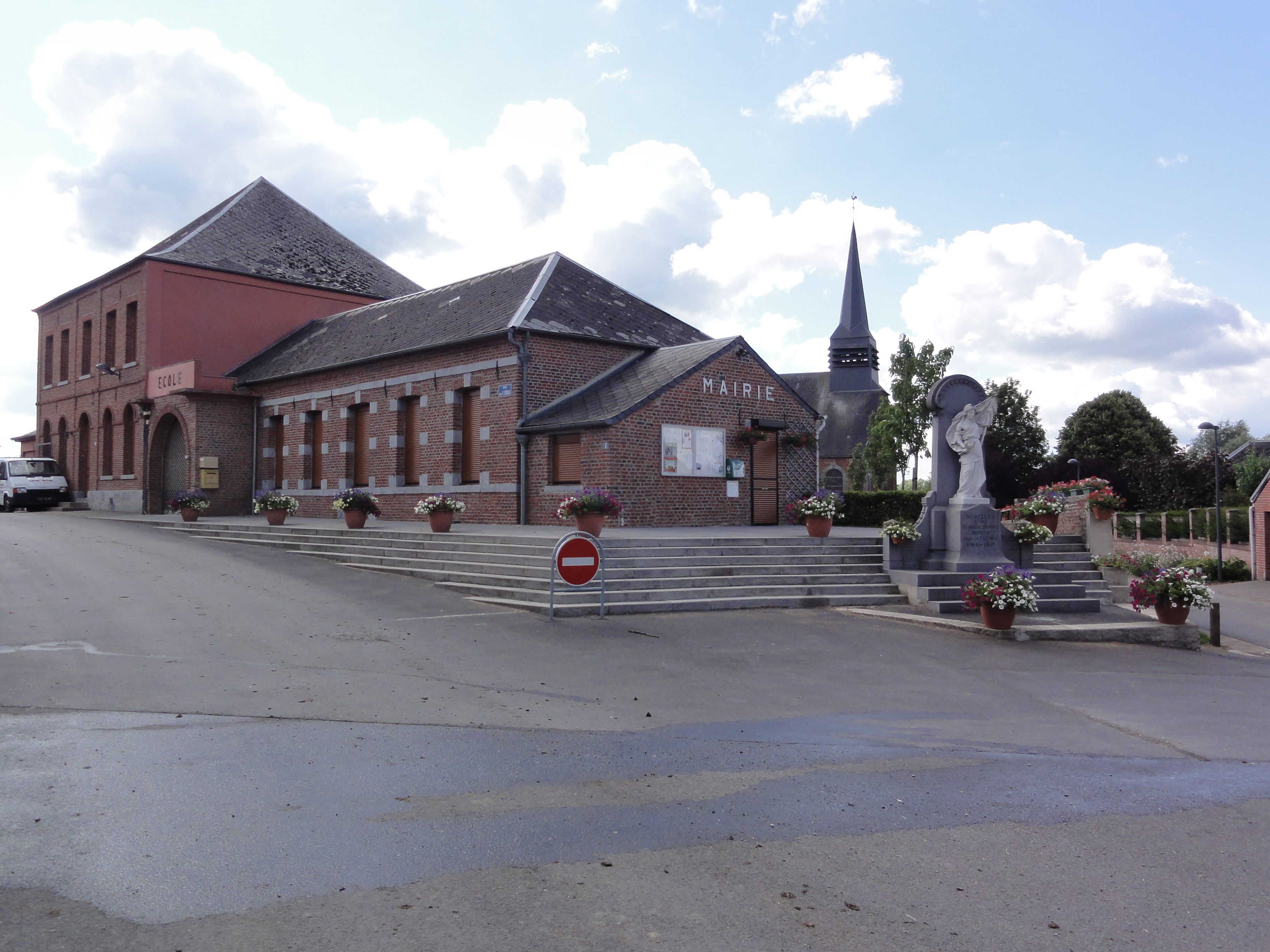 Noyelles-sur-Sambre (Nord, Fr) place avec école, mairie, église, monument